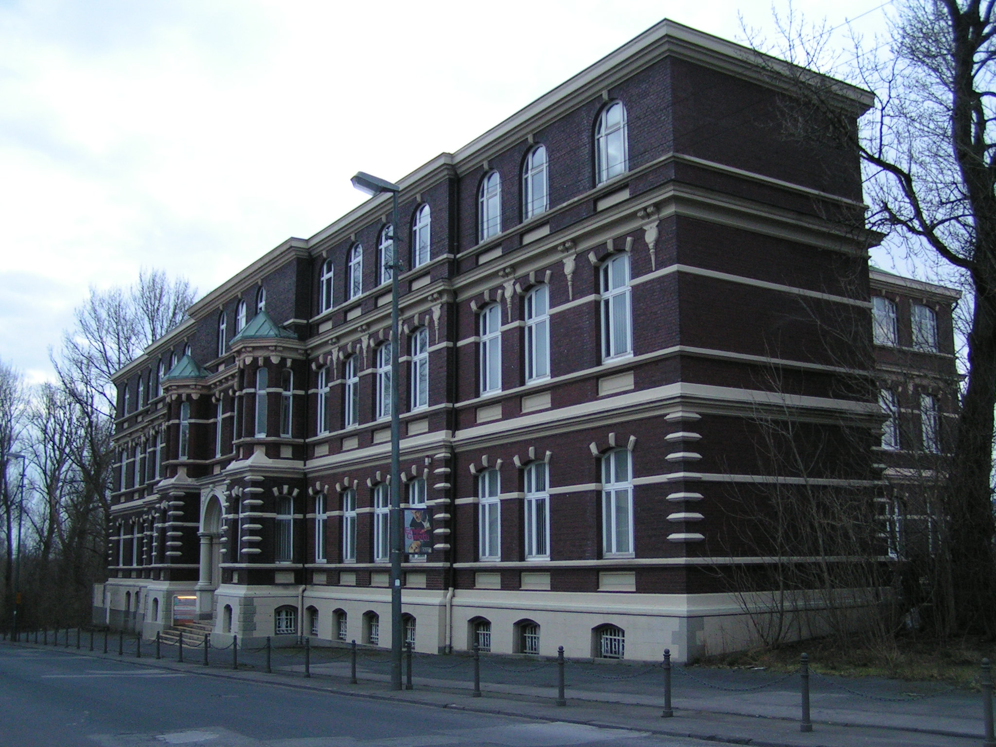 Ehemaliger Verwaltungssitz der Westfälische Stahlwerke, heutige Nutzung als Ingenieur Zentrum Bochum : The former office building of the Westfälischen Stahlwerke, now an engineer center Source: own work Date: Feb 2007, Bochum, Germany Author: Maschinenjunge Licence: GFDL, cc-by 3.0